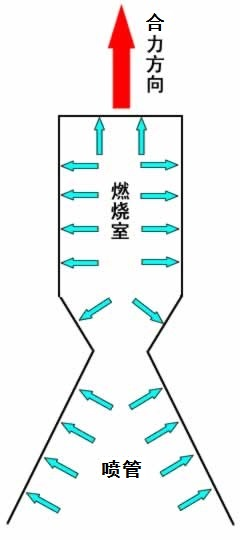 火箭工作原理